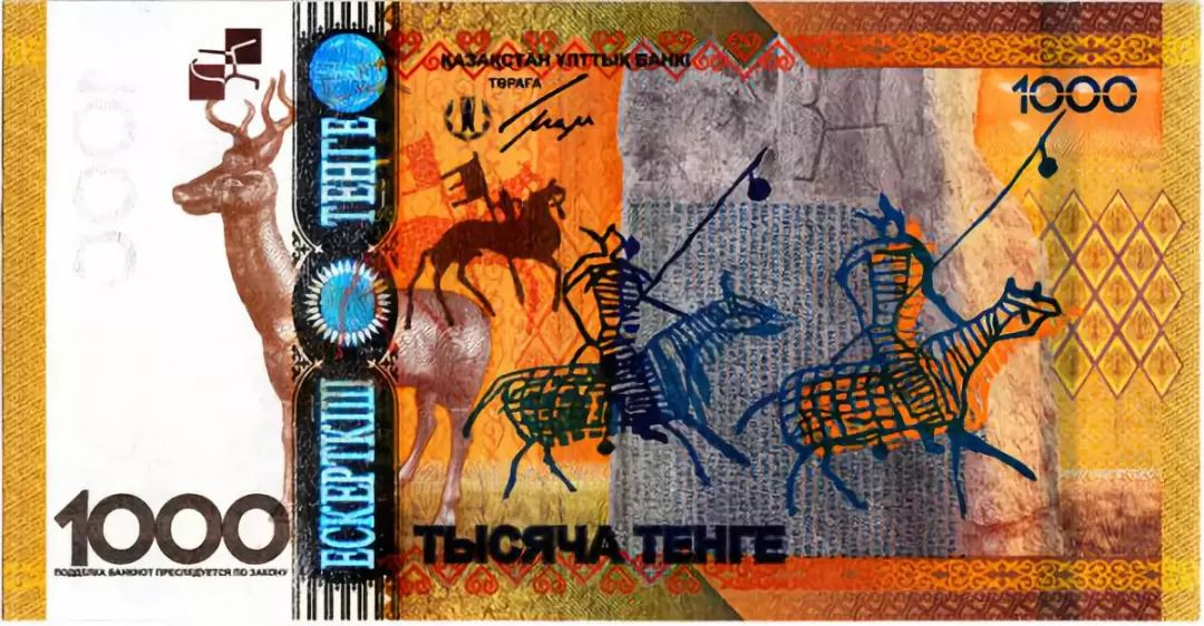 Памятная банкнота Казахстана достоинством 1000 тенге образца 2013 года.